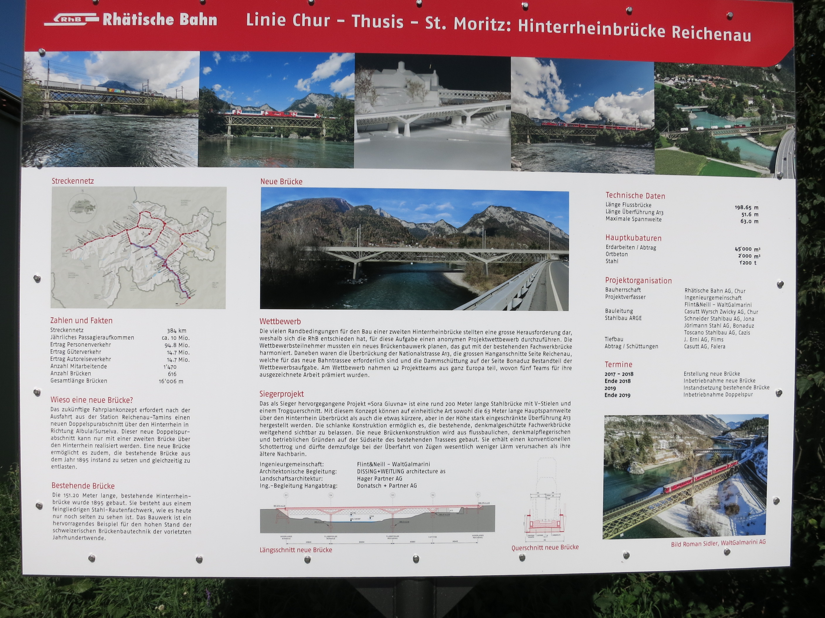 Zweite Hinterrheinbrücke RhB, Reichenau GR, Schweiz